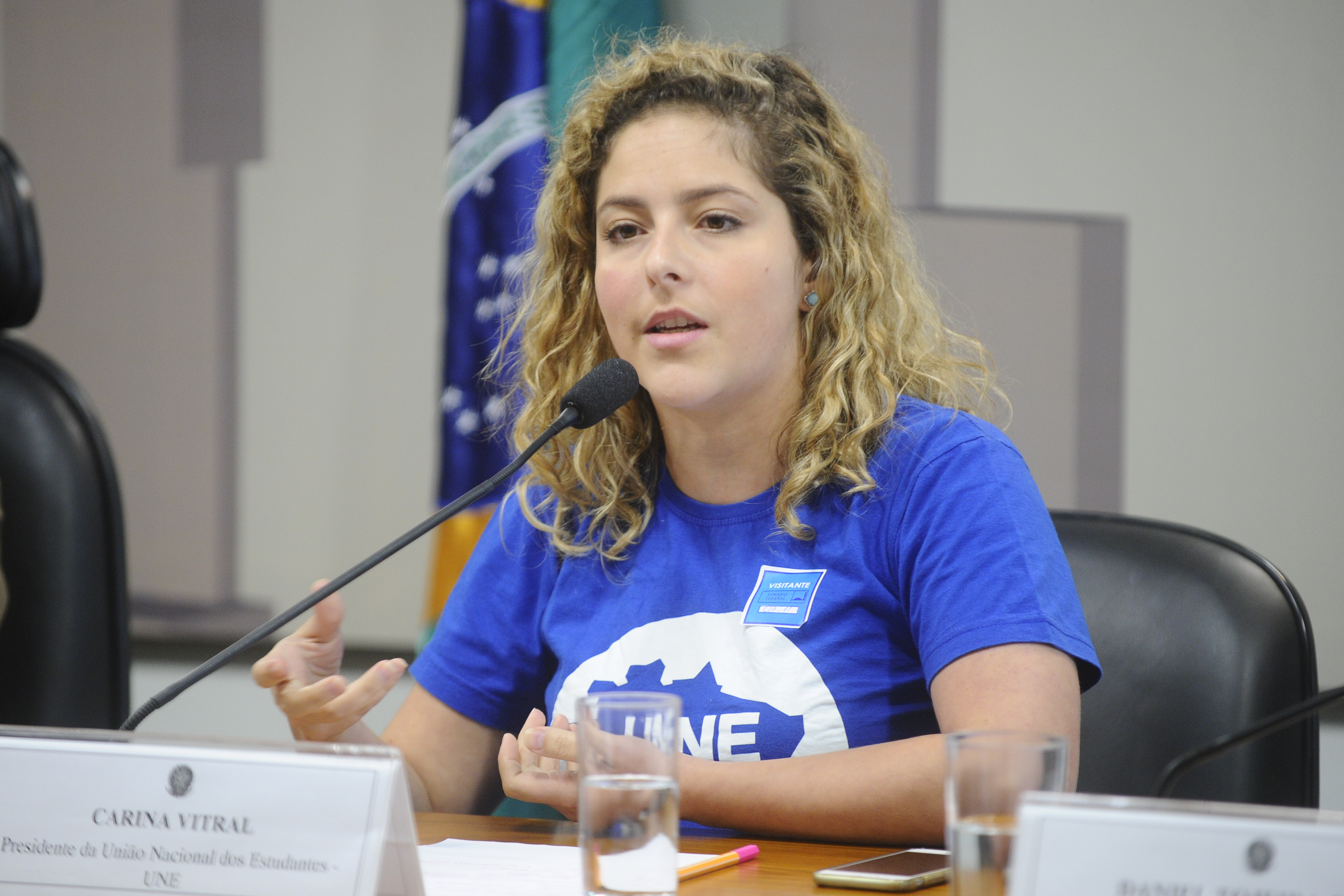 Comissão Mista da Medida Provisória (CMMPV) nº 746 de 2016, que institui a política de fomento à implementação de escolas de Ensino Médio em tempo integral, realiza audiência pública para instruir a matéria. Entre os convidados estão representantes da Ubes e da UNE. Em pronunciamento, a presidente da União Nacional dos Estudantes (UNE), Carina Vitral. Foto: Marcos Oliveira/Agência Senado